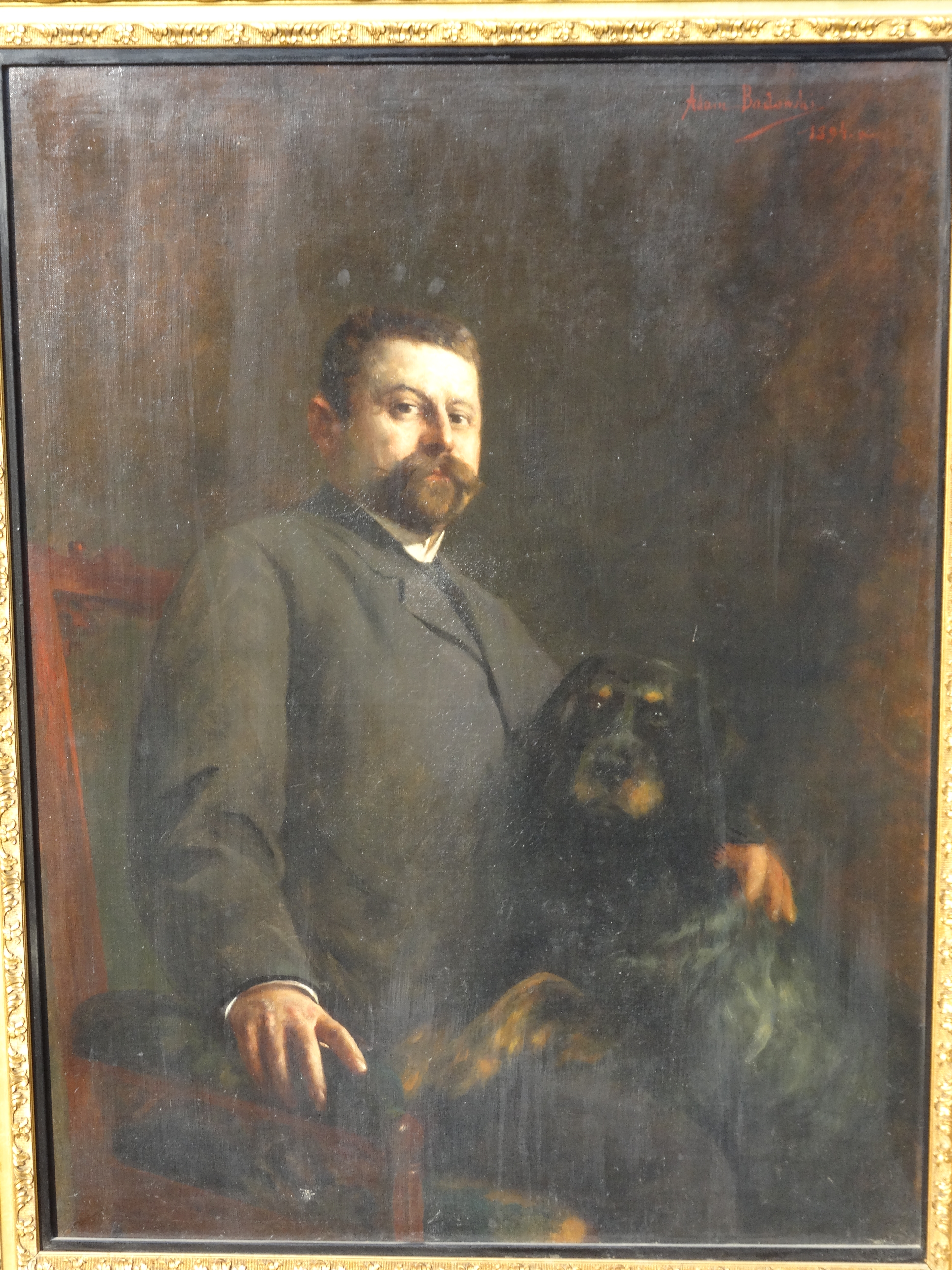 Adam Badowski, Portret z psem, 1894, olej na plotnie